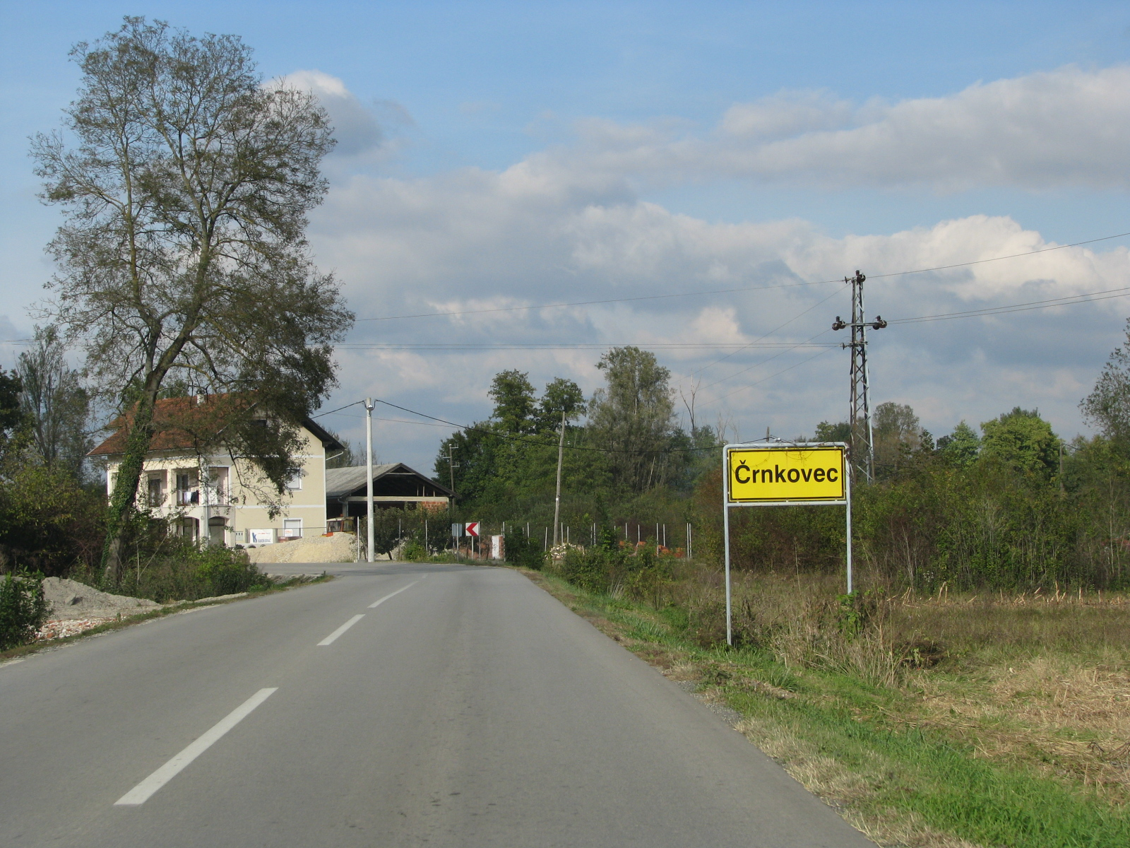 Črnkovec, Velika Gorica